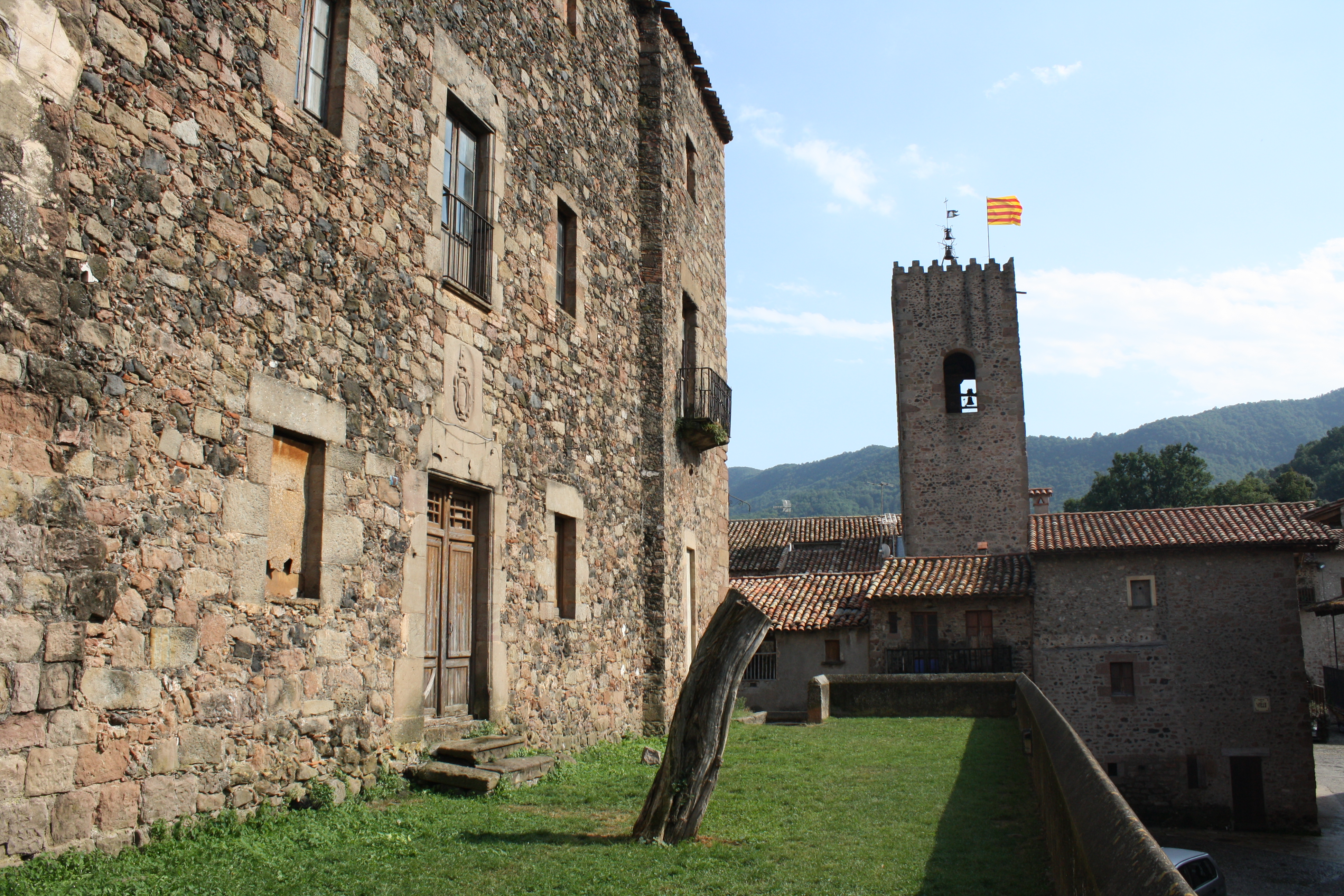 Castell de Santa Pau i, al fons, esglèsia del mateix poble.